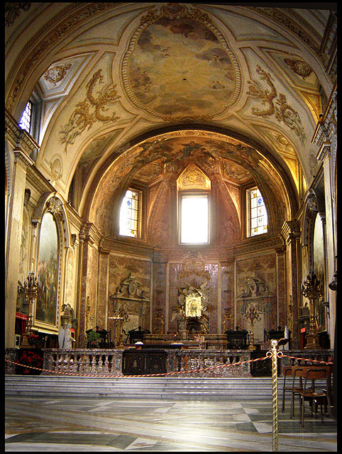 Altar principal da Igreja Santa Maria dos Anjos e dos Mártires, Roma.